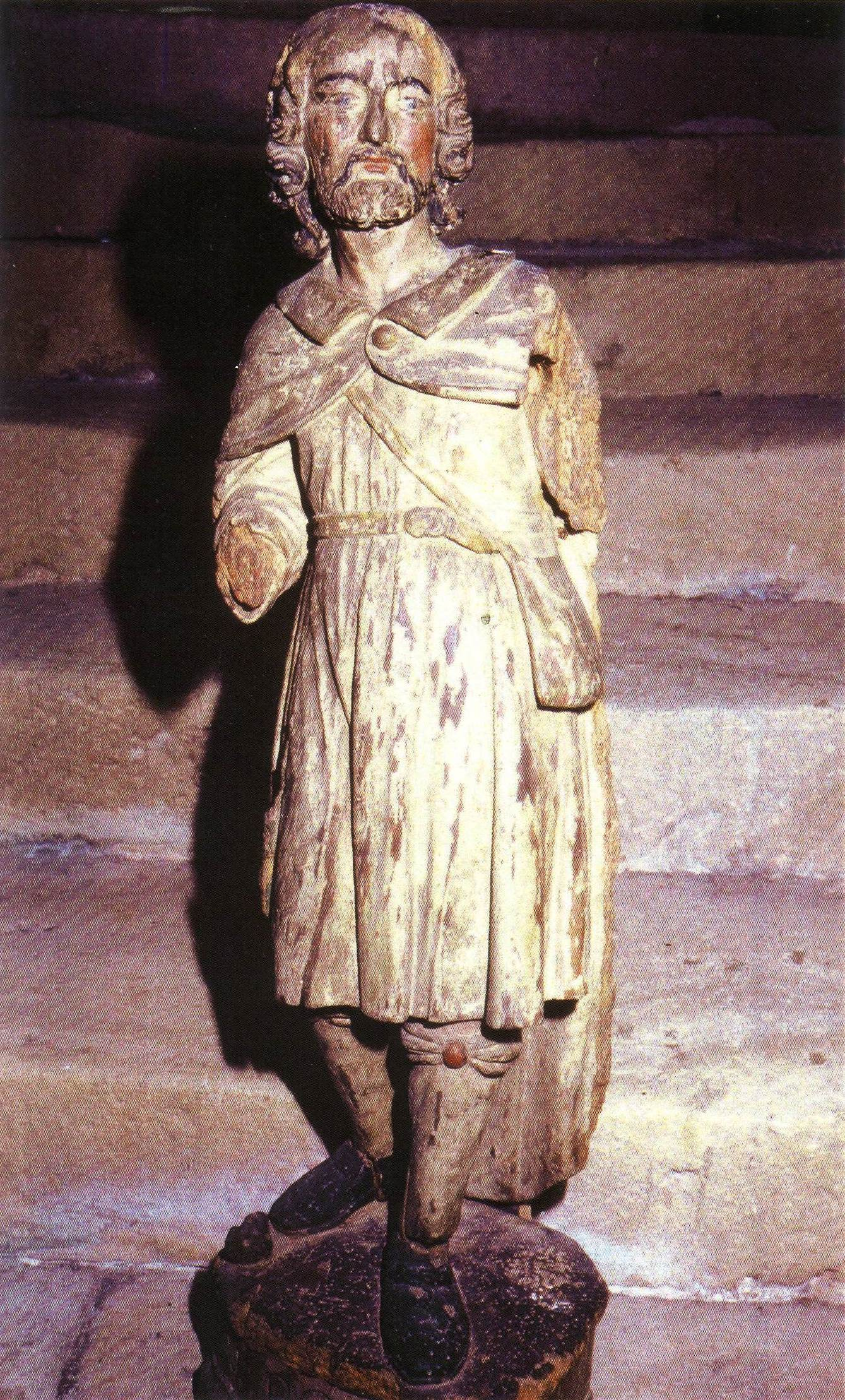 Saint Baudry, bois polychrome